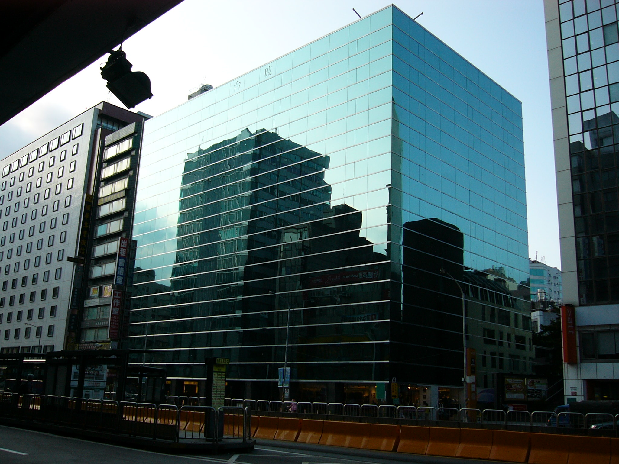 台玻大樓與台北市聯營公車「南京復興路口」候車亭。